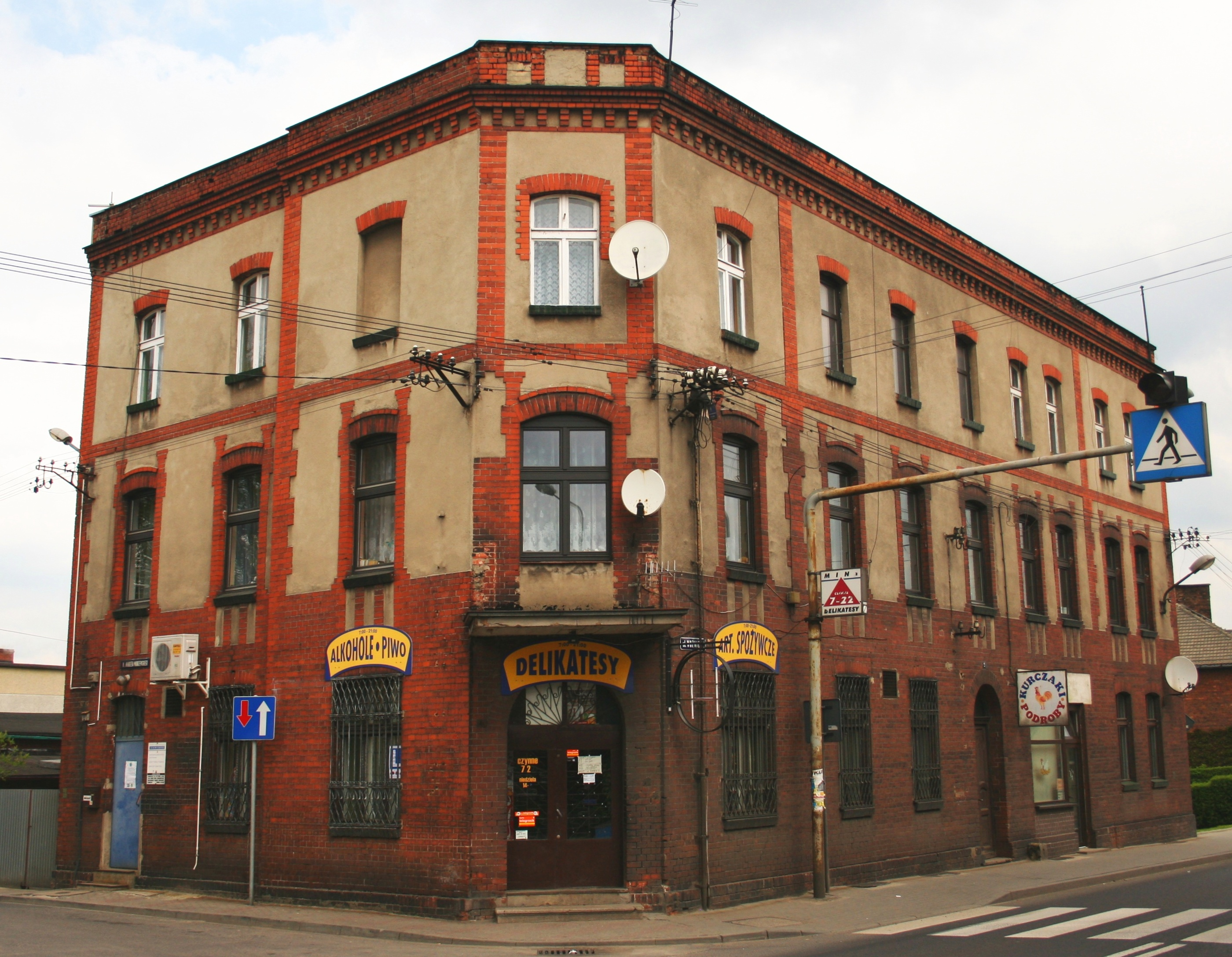 Kamienica w centrum Miasteczka Śląskiego, Polska, województwo śląskie, powiat tarnogórski